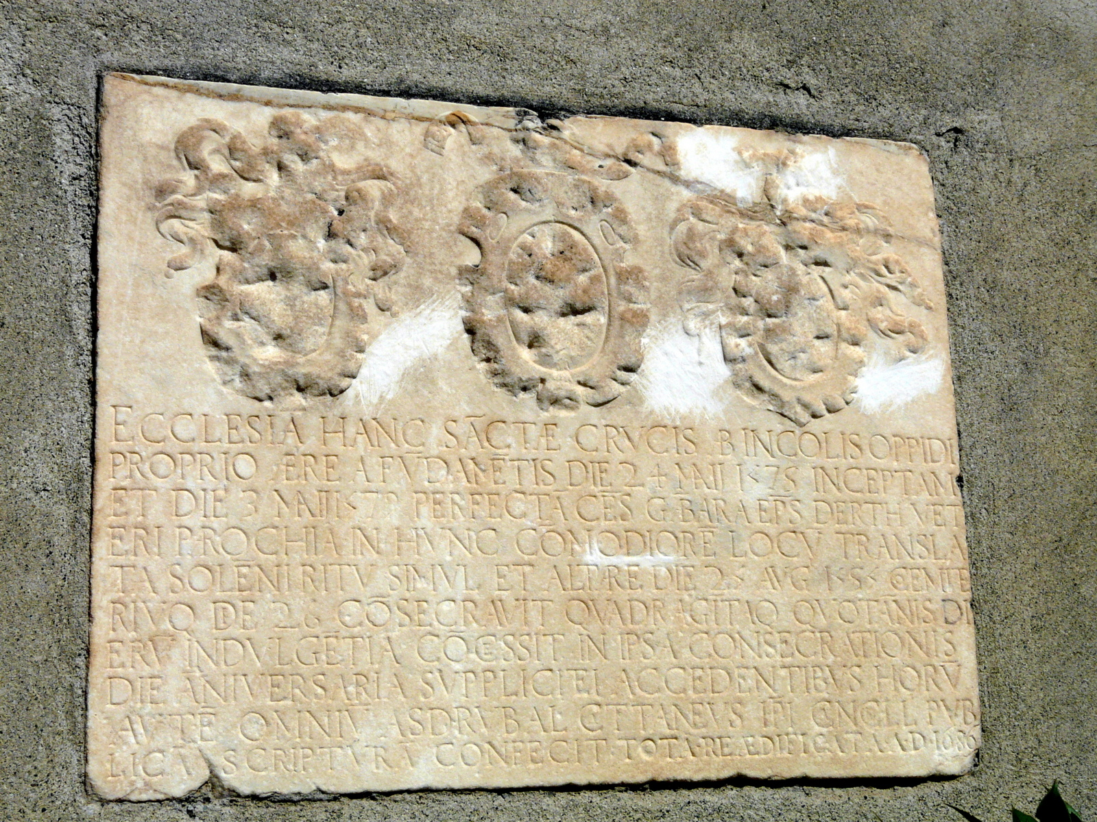 Targa presso la facciata della chiesa di Santa Croce, Crocefieschi, Liguria, Italia